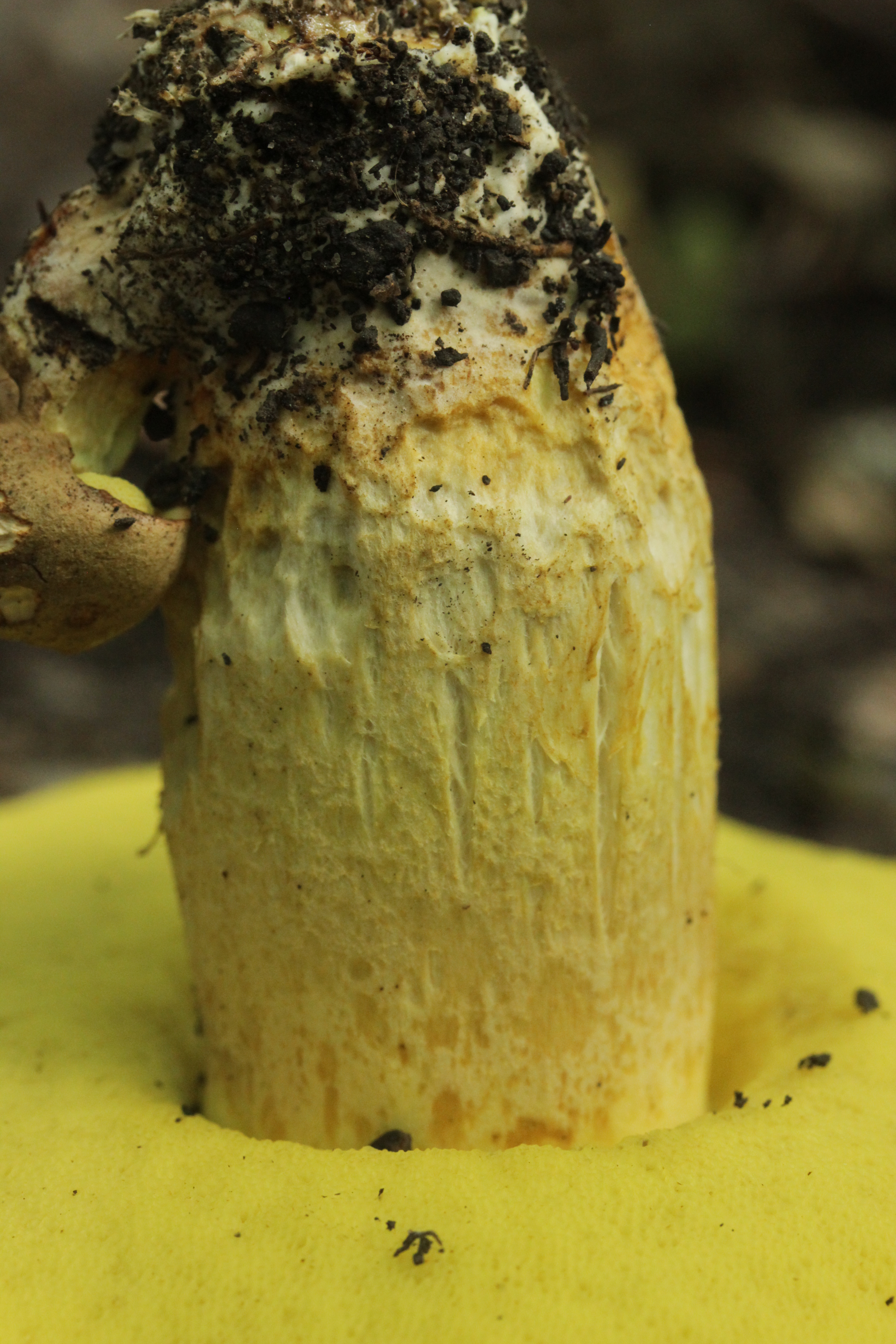 Iodine Bolete - Hemileccinum impolitum